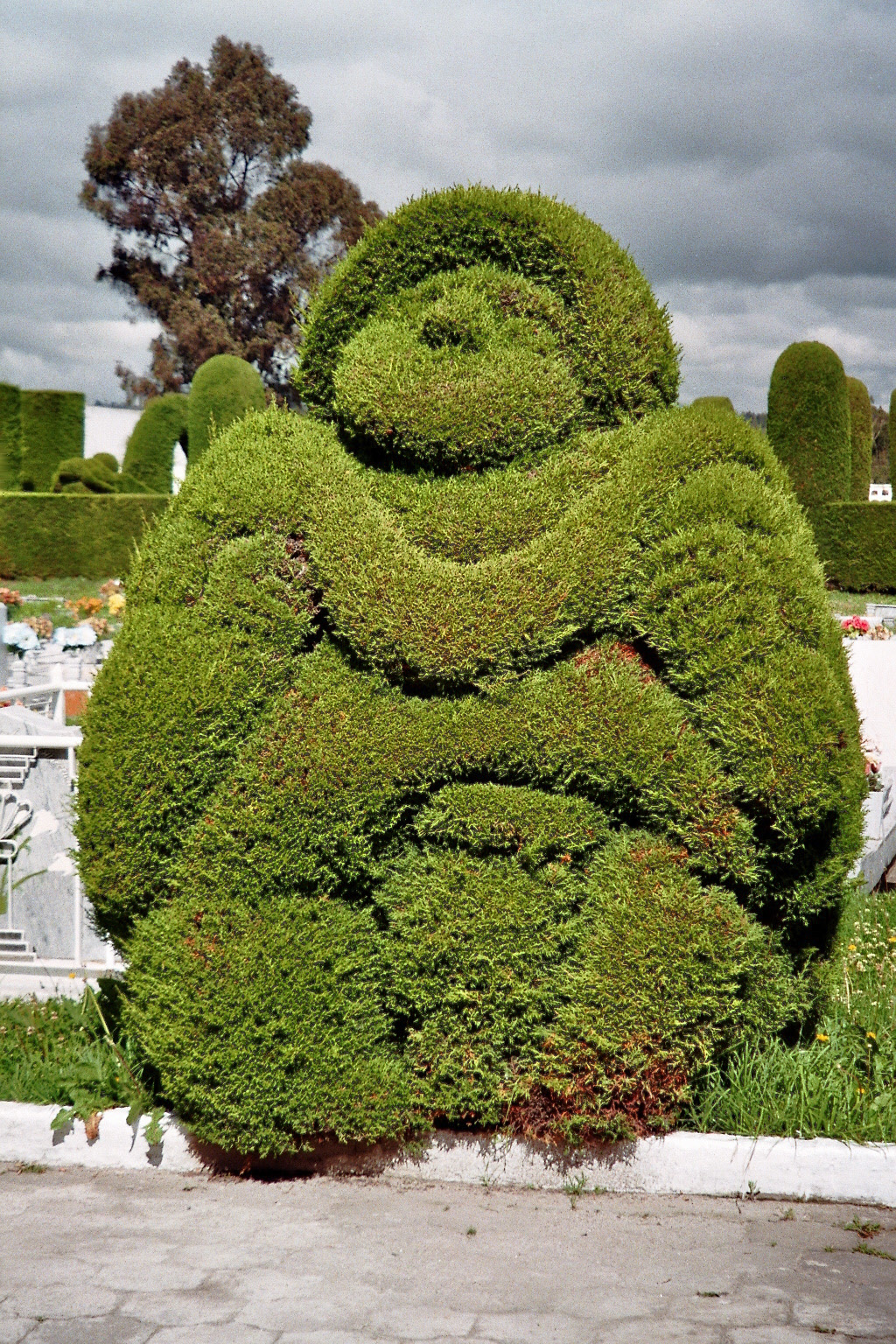 Tulcán, Ecuador: topiary garden cemetery